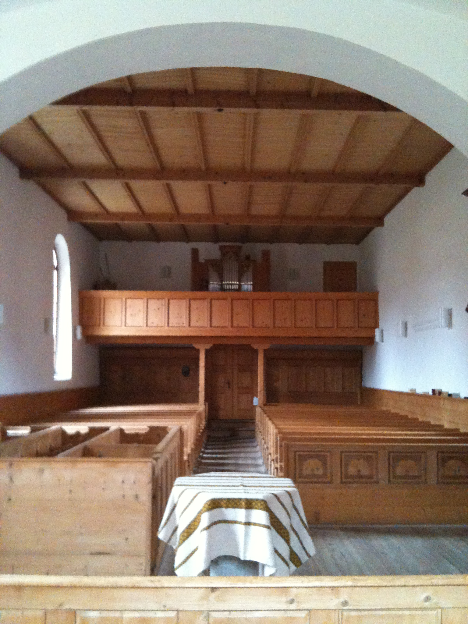 reformierte Kirche Donat GR, Kanton Graubünden, Blick aus dem Chor über den Taufstein in den Kirchenraum, auf Empore und Orgel